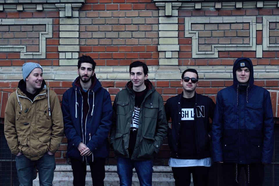 Členové kapely Call Tracy, foto:Jonáš Wach